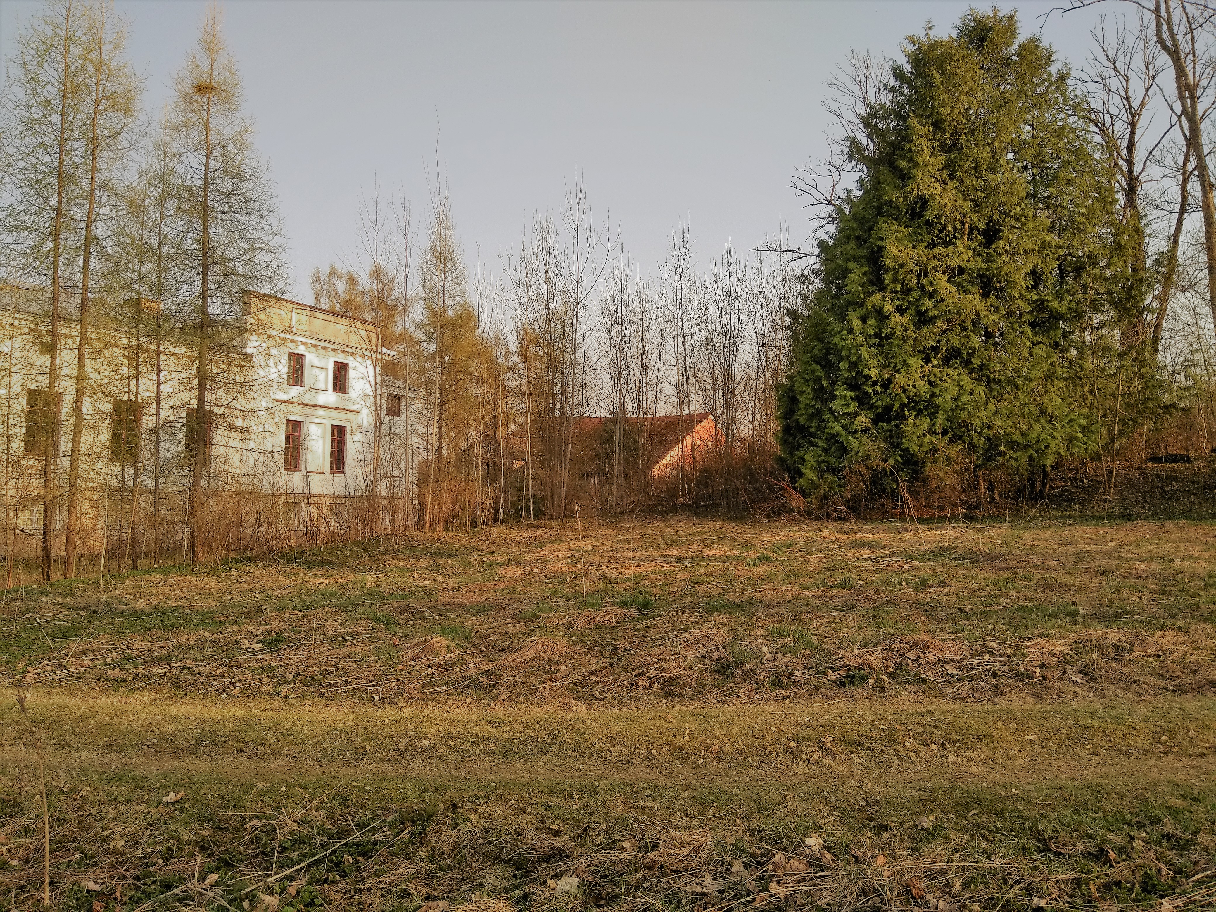 Vaade põhjasuunast linnusealal paiknevatele kunagise torn- või majalinnuse asukohale ja hilisemale mõisahäärberile.